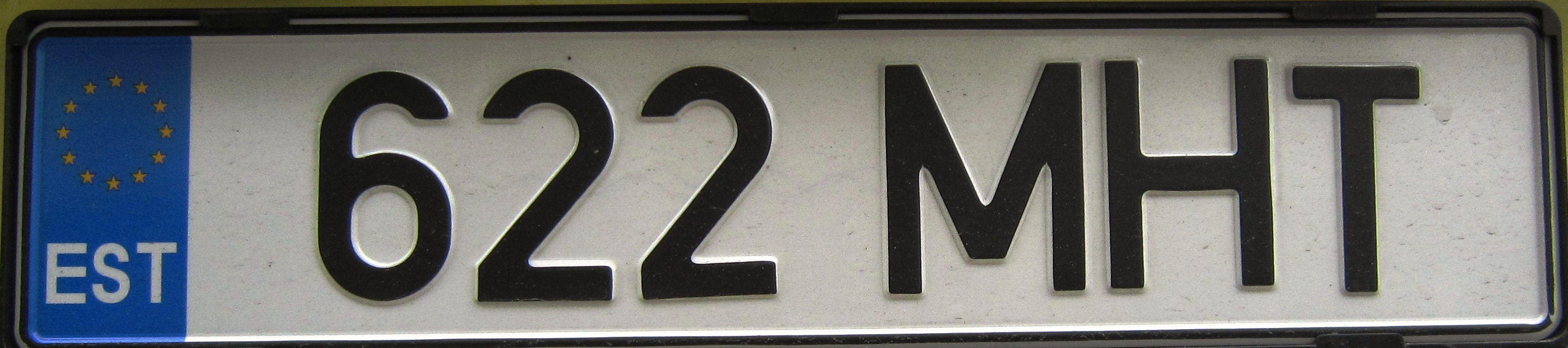 Estland kenteken EU